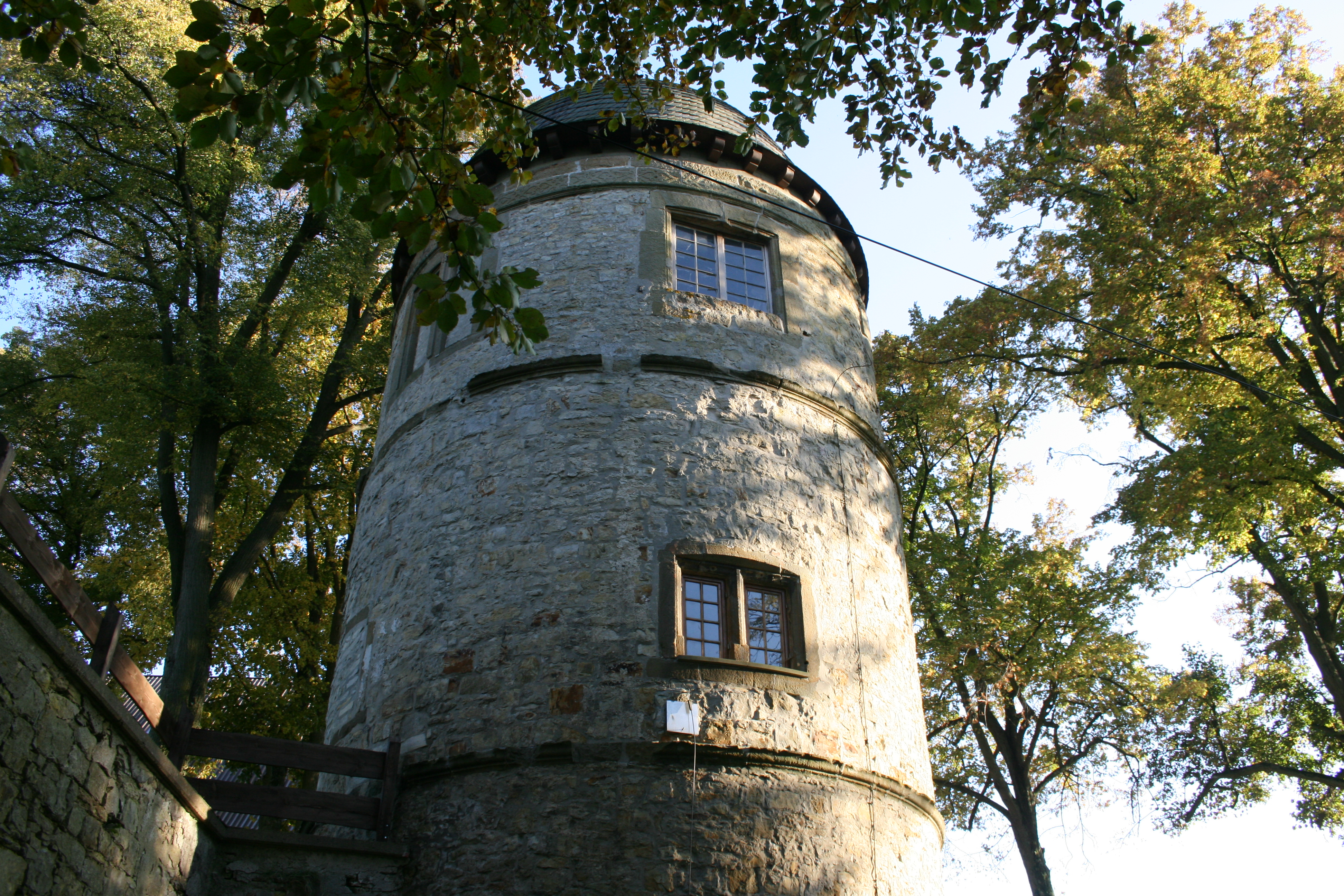 Gut Volbrexen; Bild des Wohnturms auf Gut Volbrexen